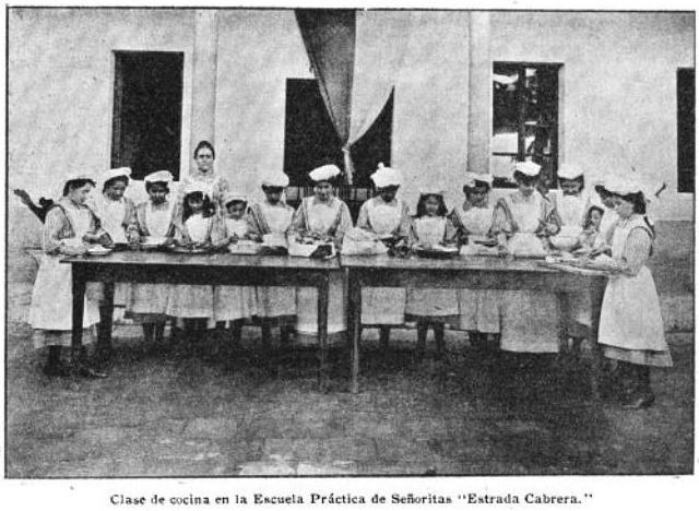 Clase práctica de cocina en la Escuela práctica para Señoritas de Guatemala